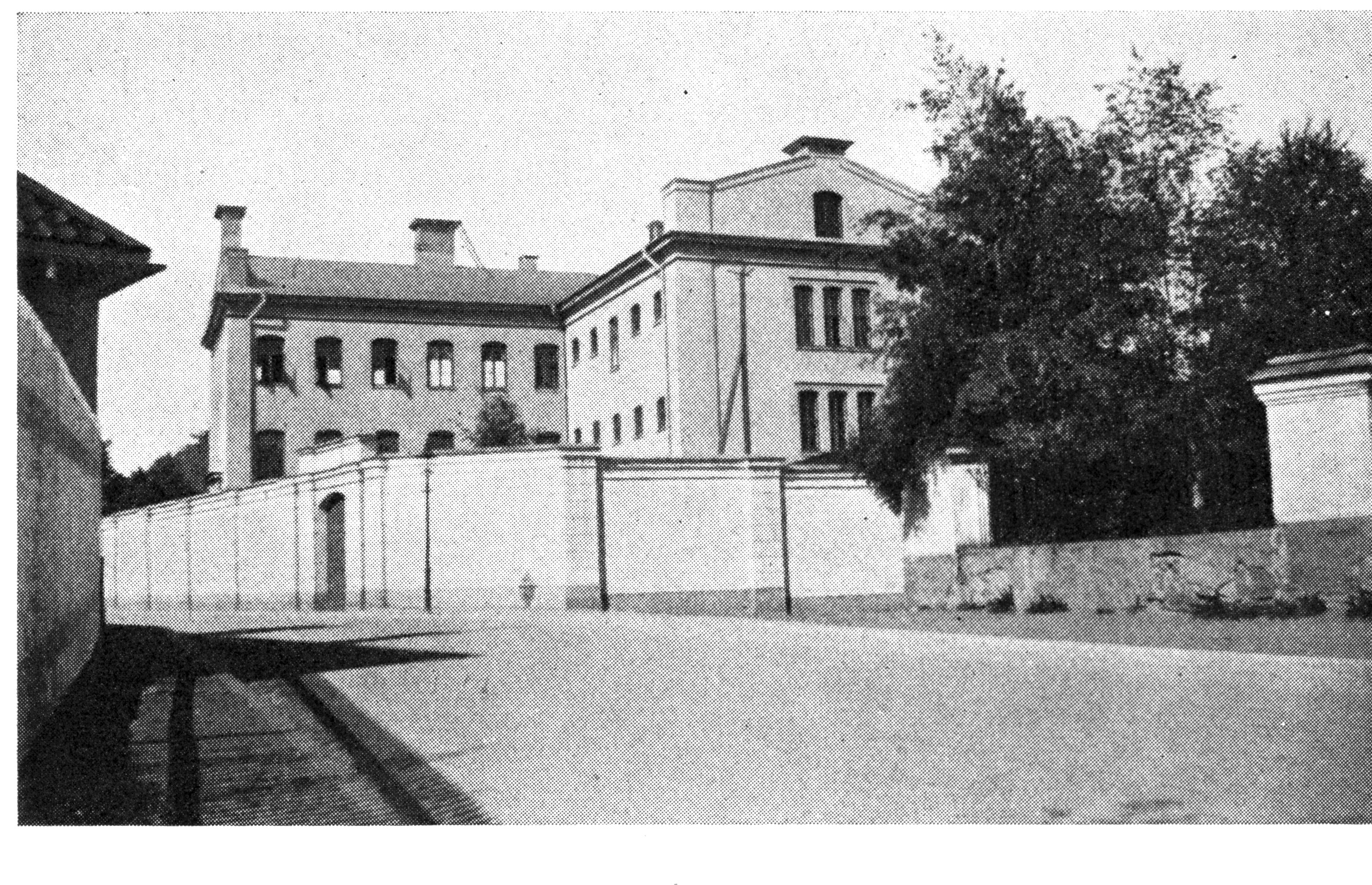 Länsfängelset i Gävle